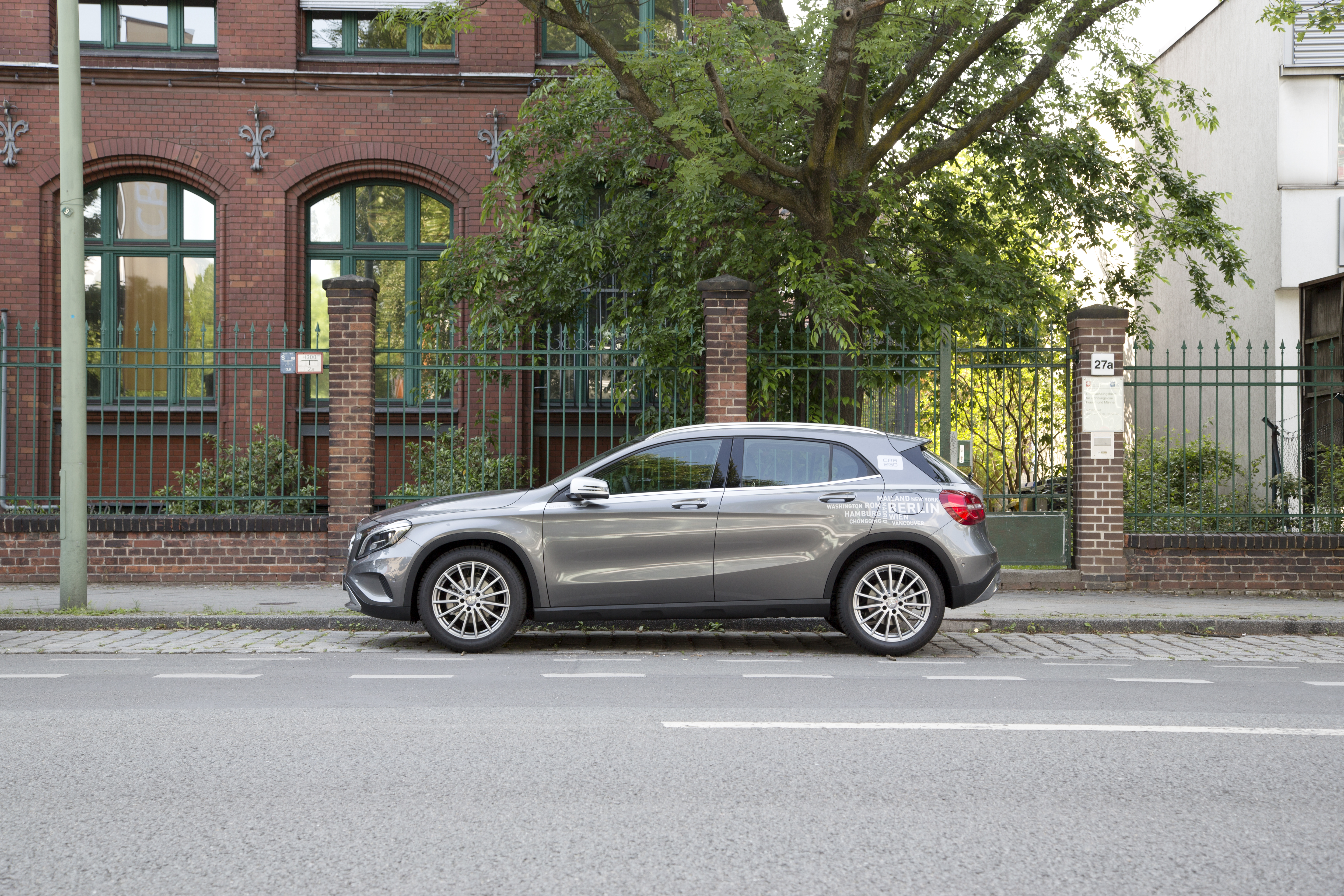 Ein Mercedes GLA-Klasse car2go aus dem Jahr 2016